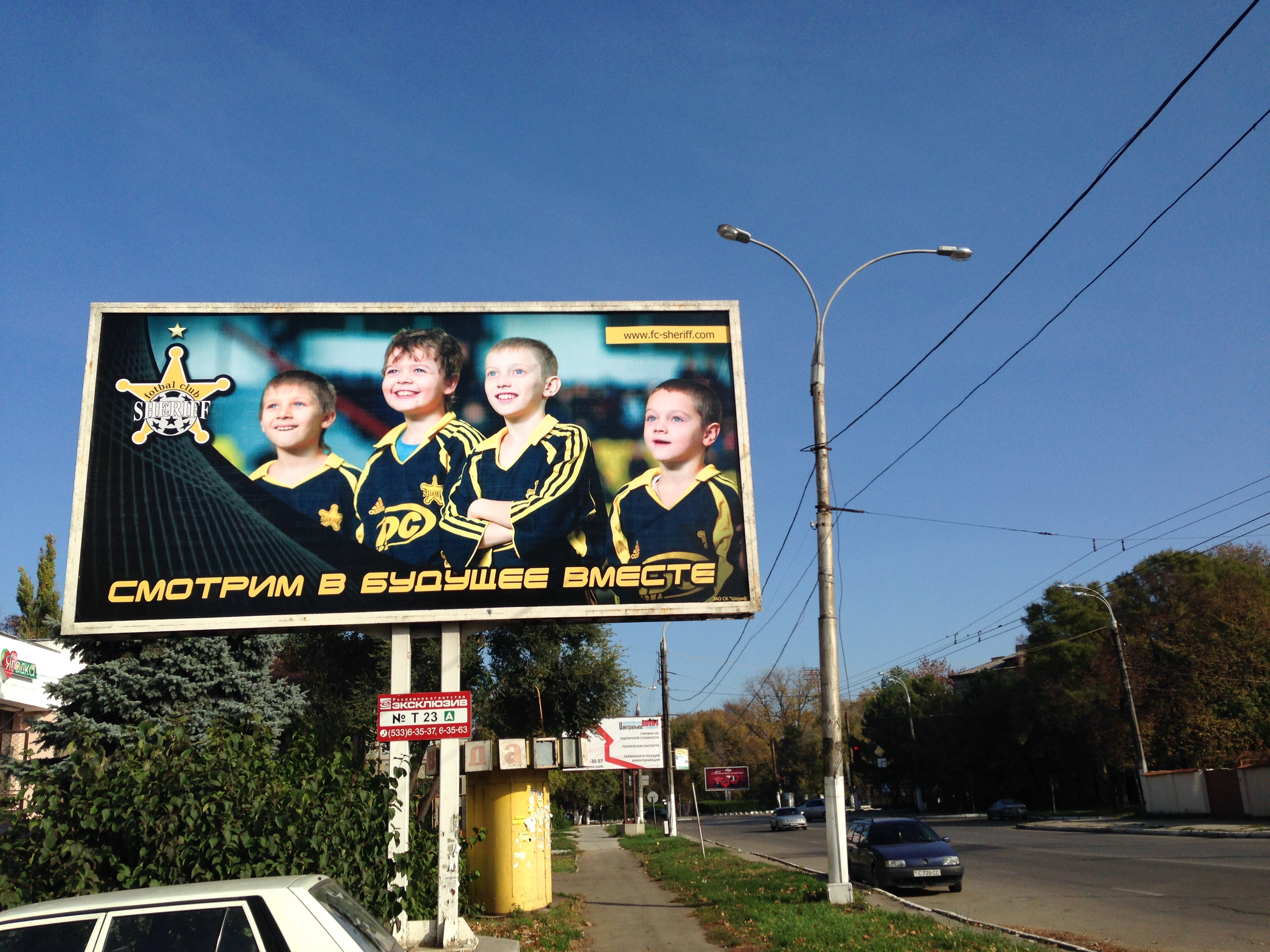 Рекламный щит по ул. К.Либкнехта в Тирасполе